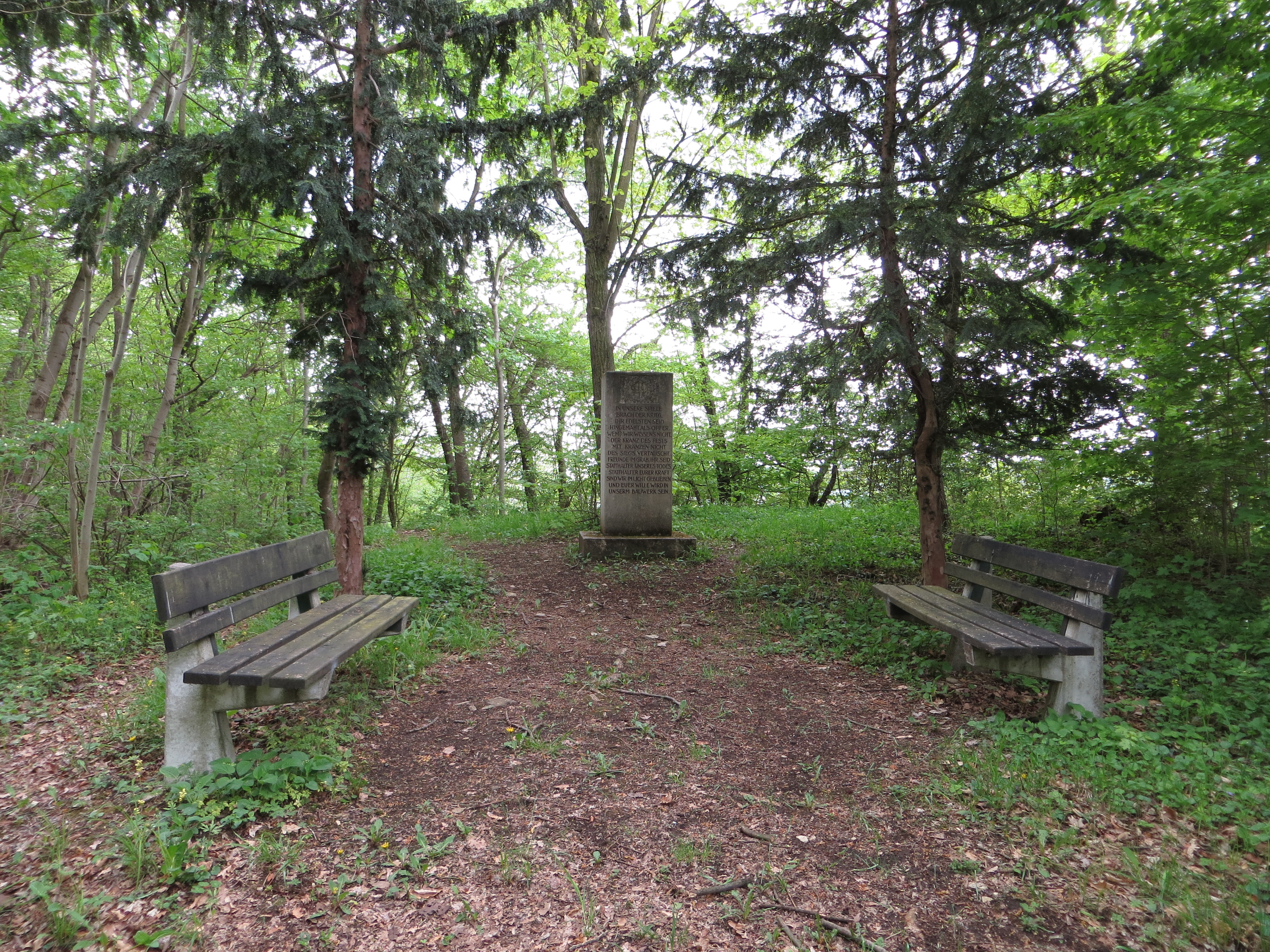 Serastein zum Gedenken an die gefallenen jungen Männer im 1. Weltkrieg; Standort im Naturschutzgebiet „Hohe Lehde“, Saale-Holzland-Kreis, Thüringen